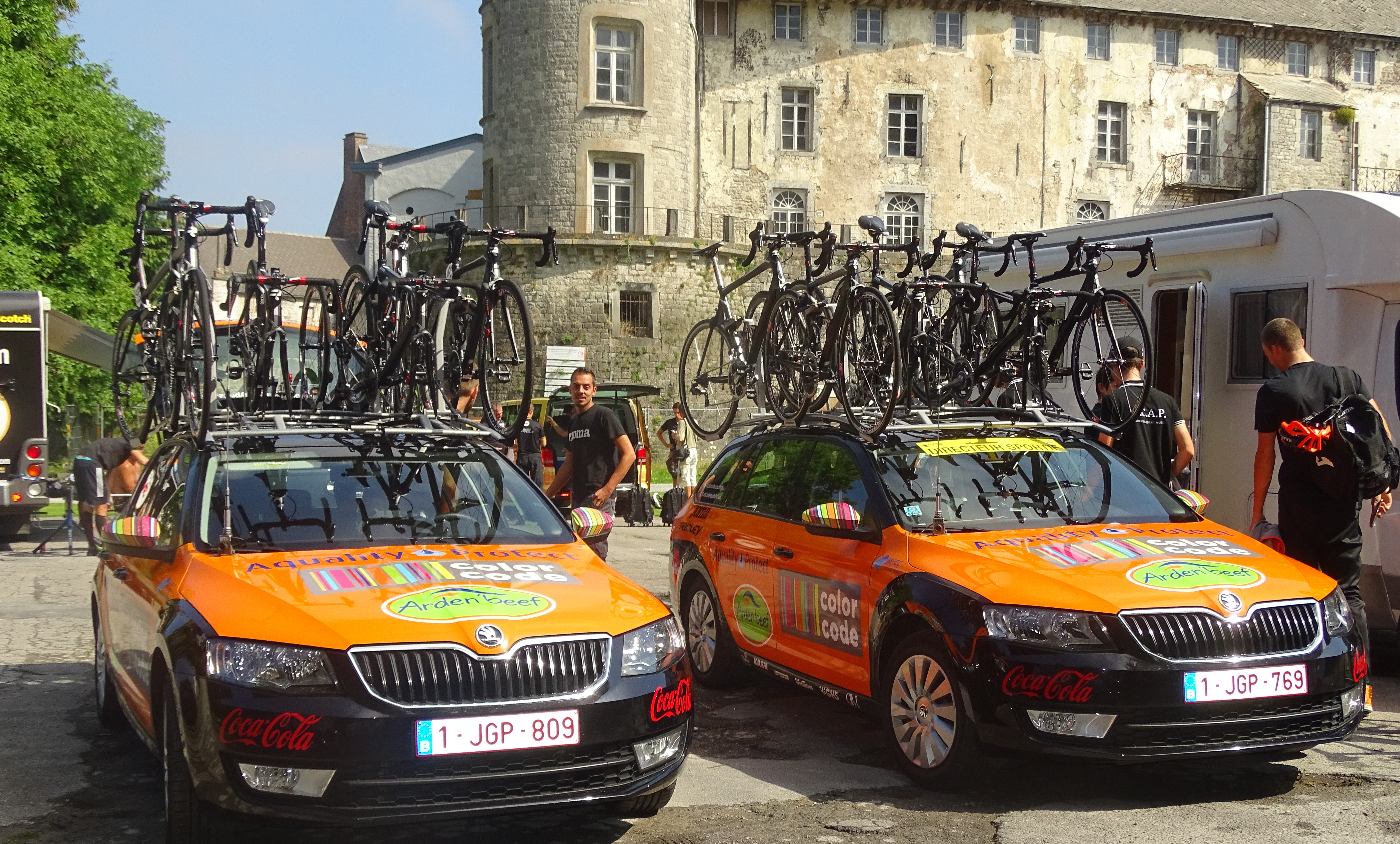 Reportage réalisé le vendredi 7 août à l'occasion du départ de la troisième étape du Tour de la province de Namur 2015 à Florennes, Belgique.